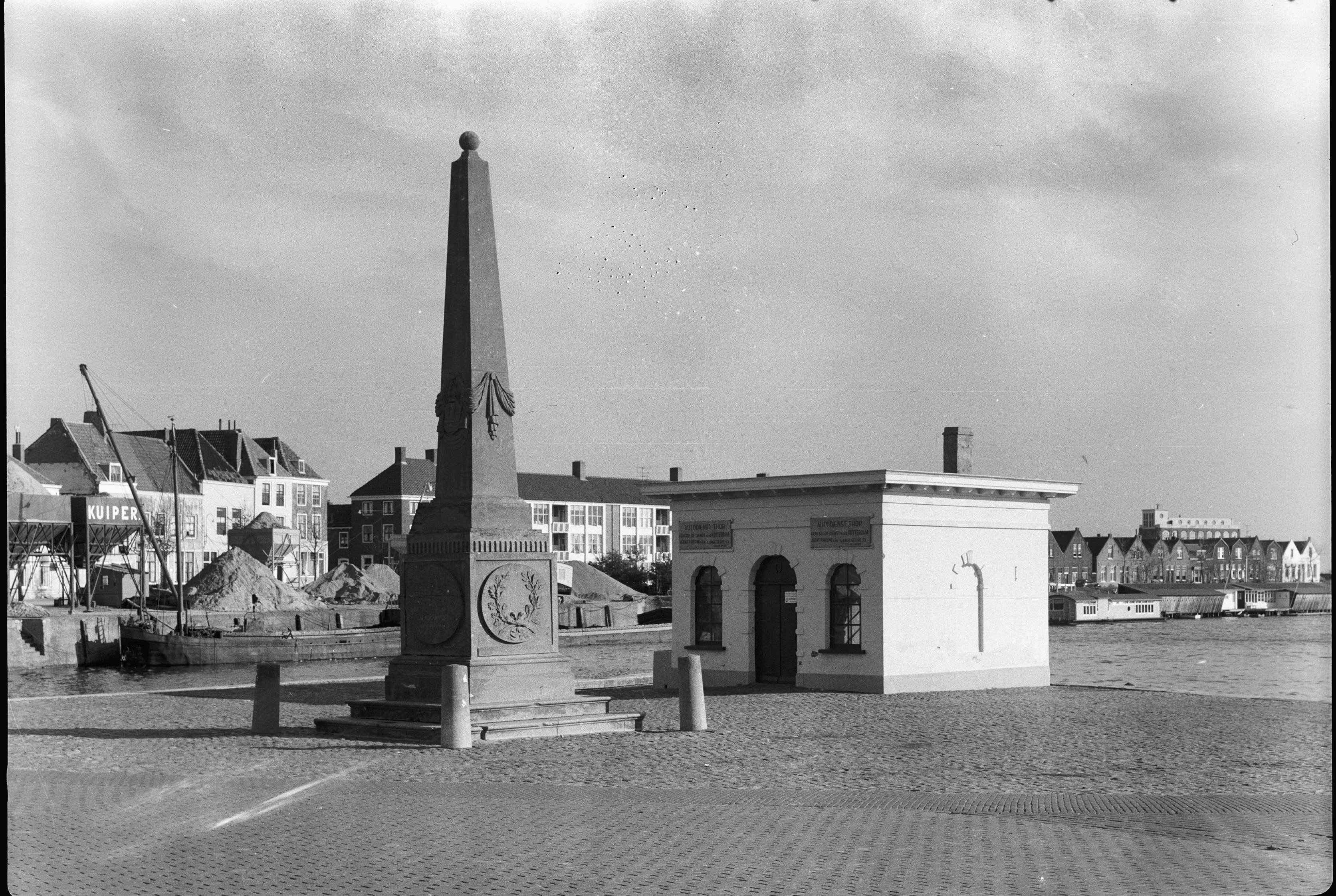 Gedenknaald: Gedenknaald 1817 en havenkantoortje op de hoek van de Rouaanse Kaai